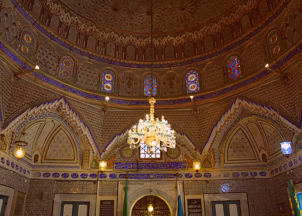 Zaouïa Sidi-Brahim, Tunis